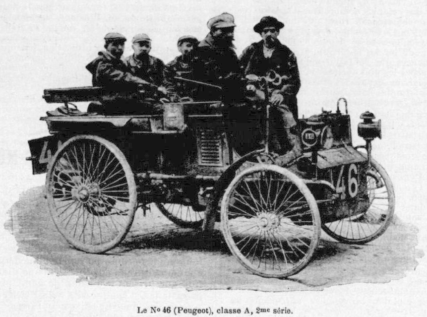 Peugeot n°46 de Berlet, Paris-Marseille-Paris 1896 - La Science Française, 1906, p.212-213 (article La course de Marseille, d'Yves Guédon)